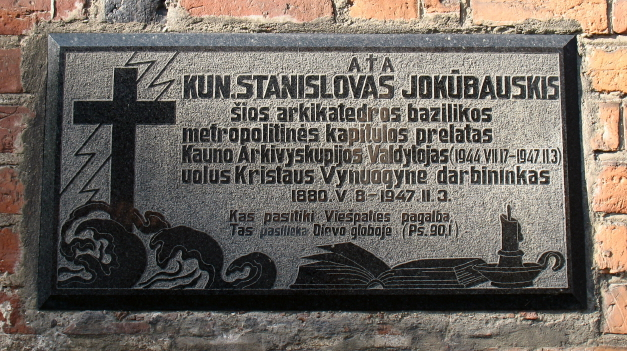 Kunigo Stanislovo Jokūbauskio kapas Kaune.